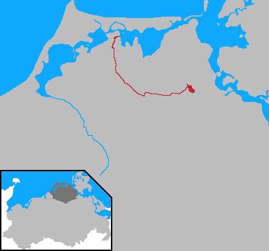 Der Verlauf des Flusses Barthe in Mecklenburg-Vorpommern.